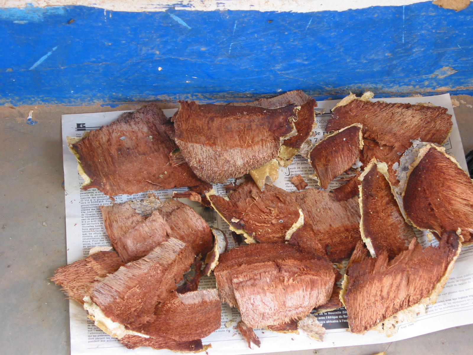 bark of Boswellia dalzielii, traditional medicine